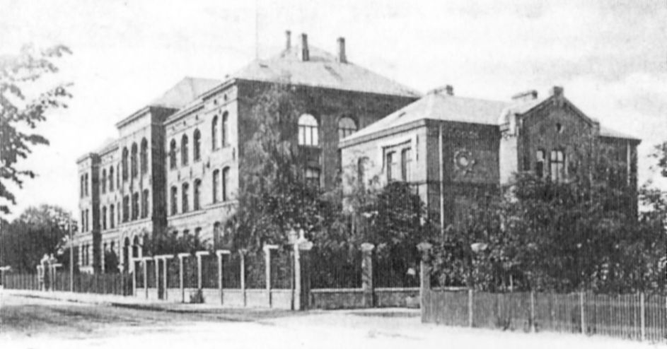 Fotografie (Postkarte) des Friedrich-Franz-Gymnasiums in Parchim